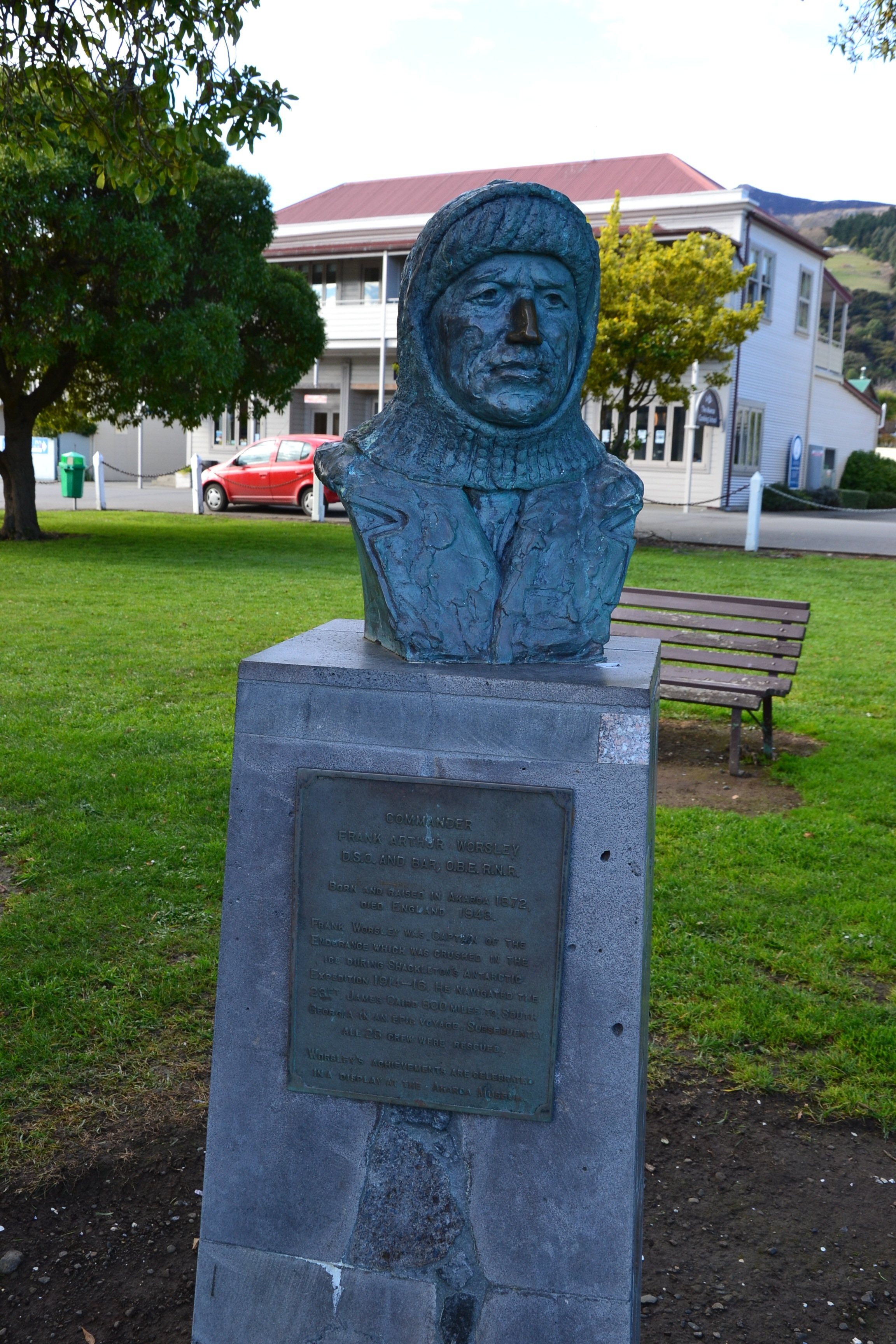 Statue à la mémoire de Frank Worsley située à Akaroa en Nouvelle-Zélande